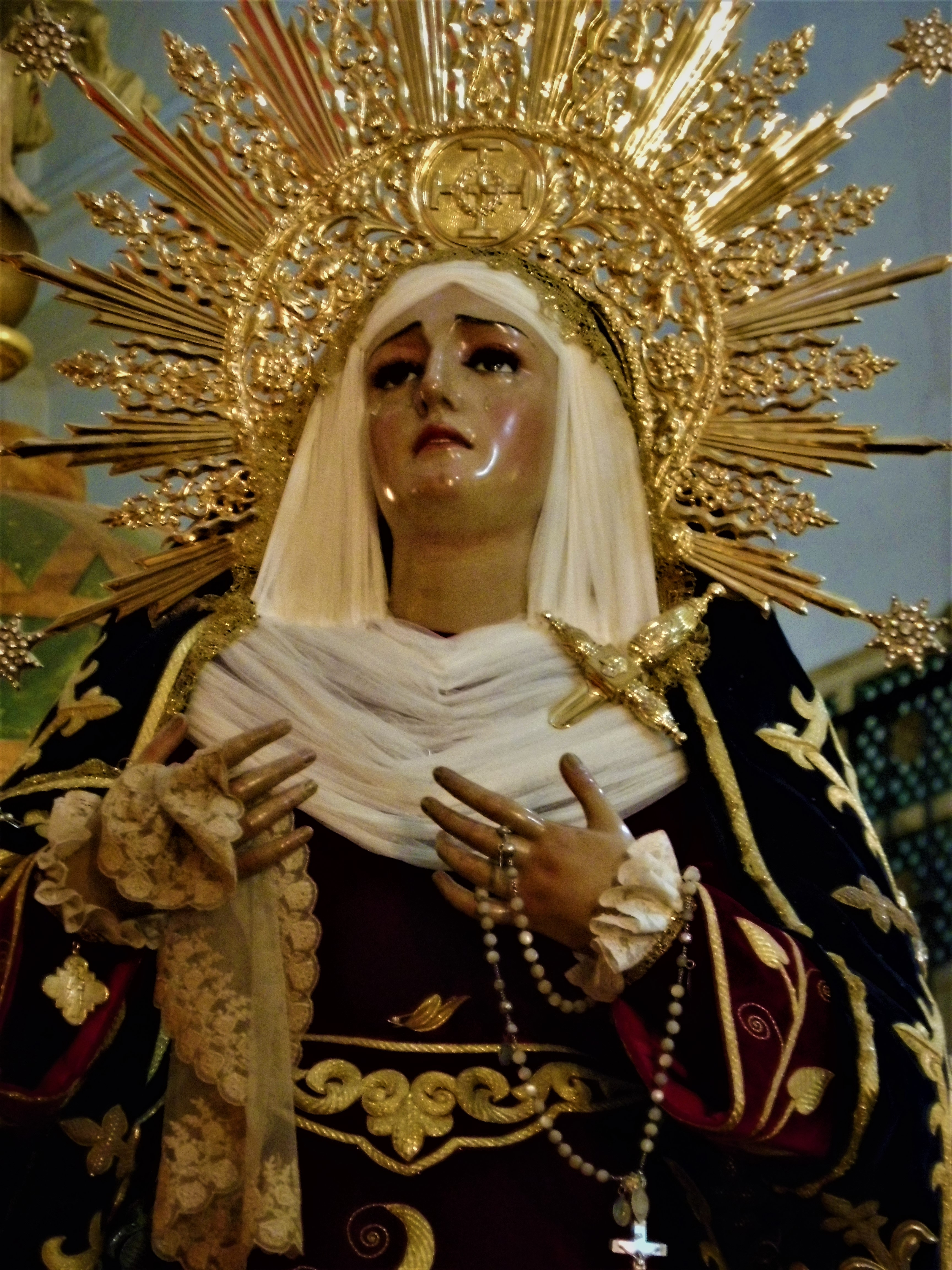 Virgen de la Antigua (Sevilla)